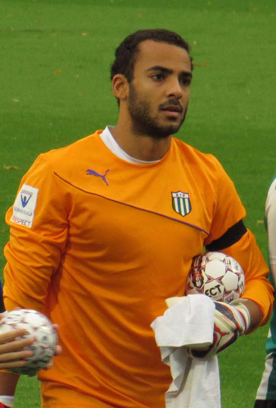 Craig Hill, yhdysvaltalainen jalkapallomaalivahti FC KTP:n joukkueessa kaudella 2015.